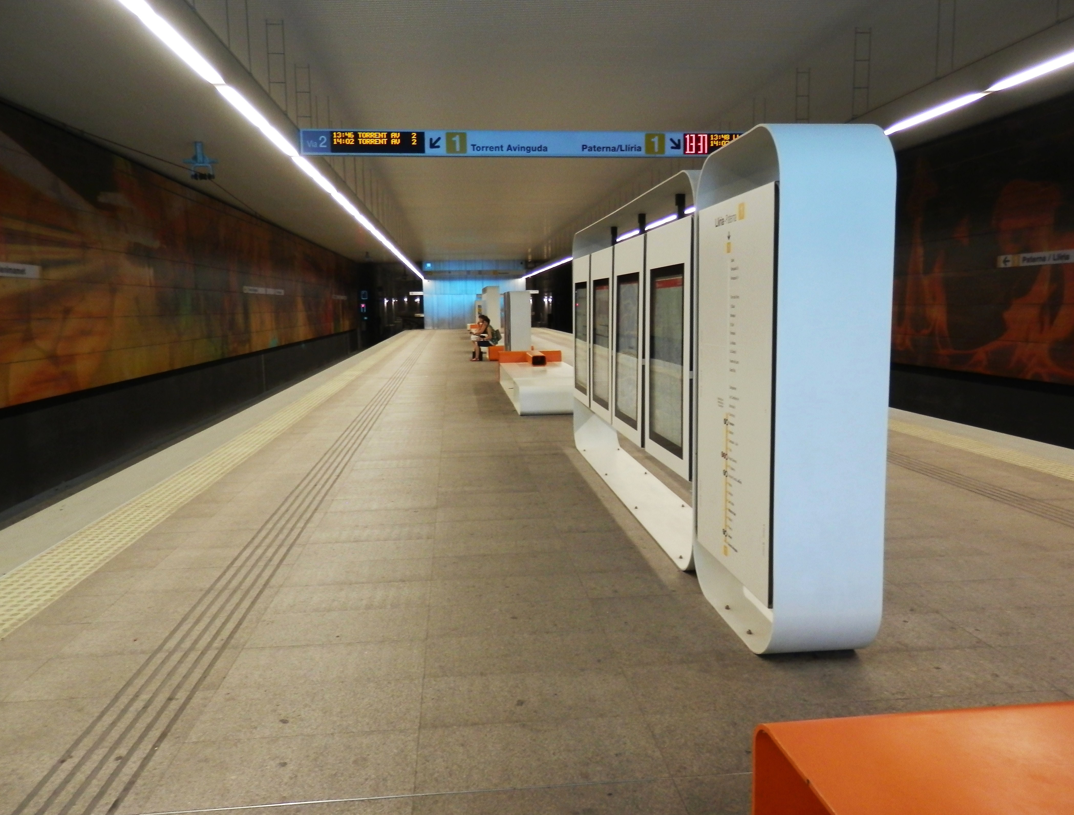 Interior de l'estació de Benimàmet.